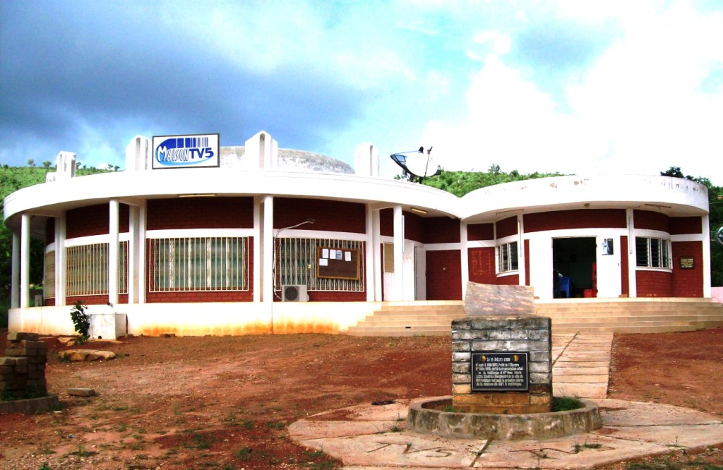 Batiment construit grace à la coopération entre Natitingou et Huy. il abrite aujourd'hui la maison TV5 de Natitingou, deuxième du genre au Bénin